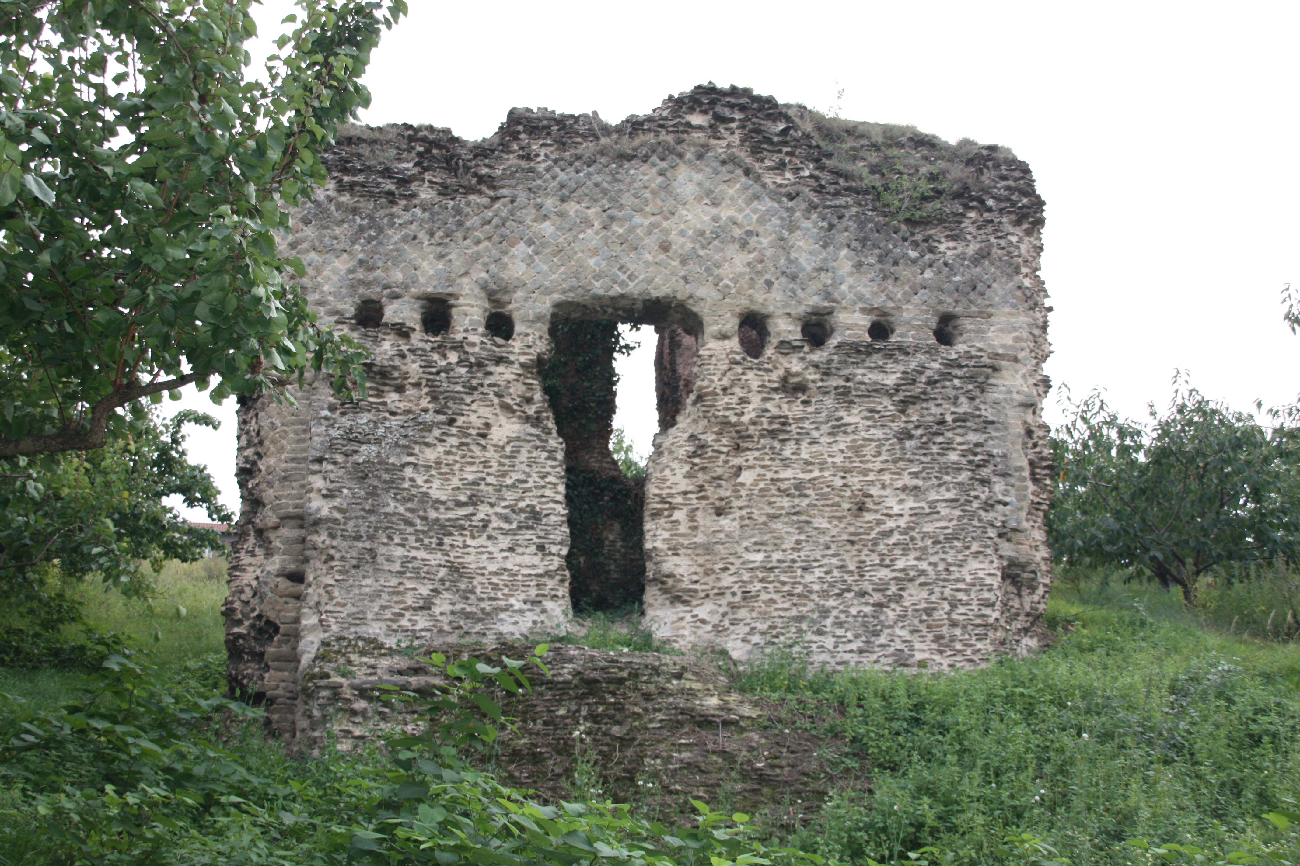 Le réservoir de chasse du Siphon de la Durèze Génilac, Loire, France - Photo prise avec l'aimable autorisation des propriétaires. .